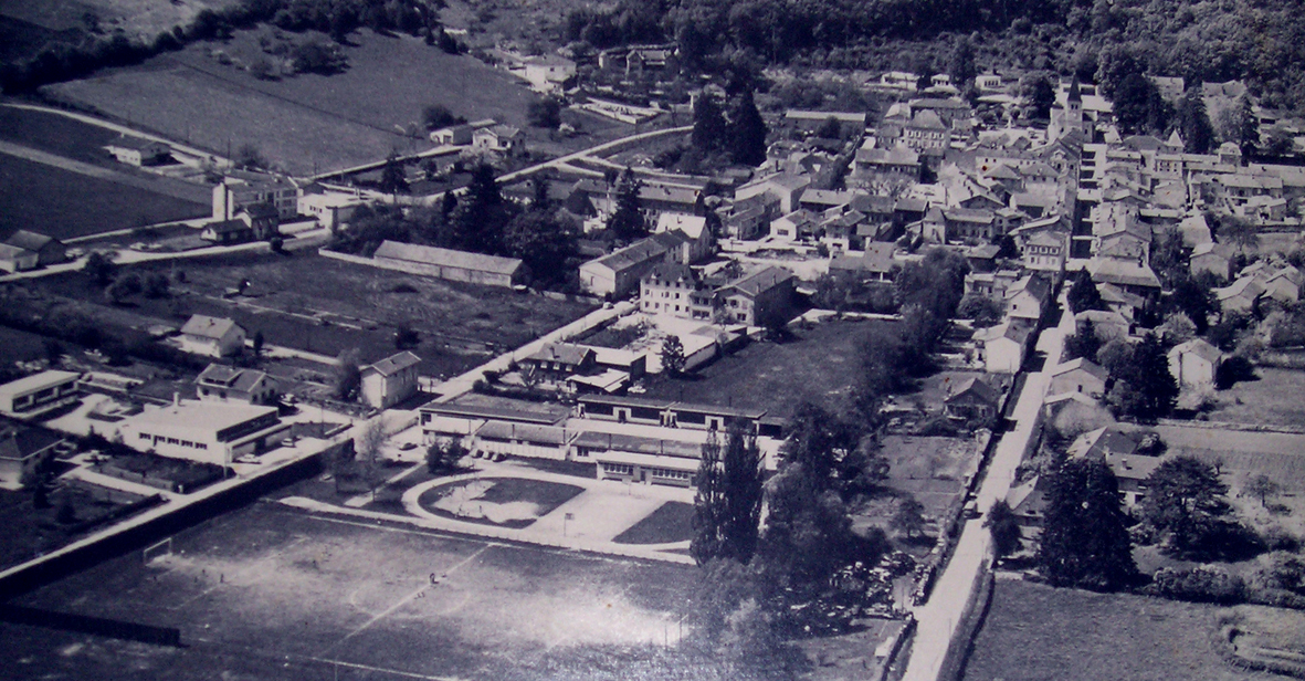 Le bourg de Lugny, photographié vers 1970.